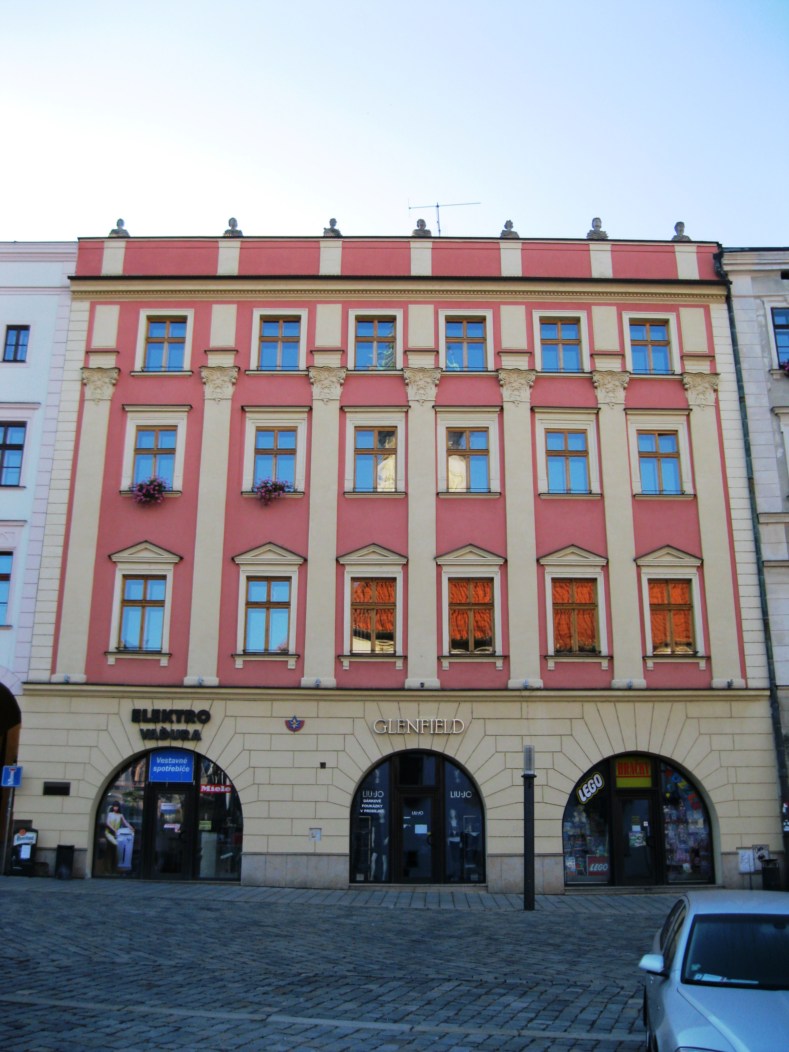 Měšťanský dům U zlaté hvězdy (Olomouc), Horní nám., Školní 202/15, Olomouc